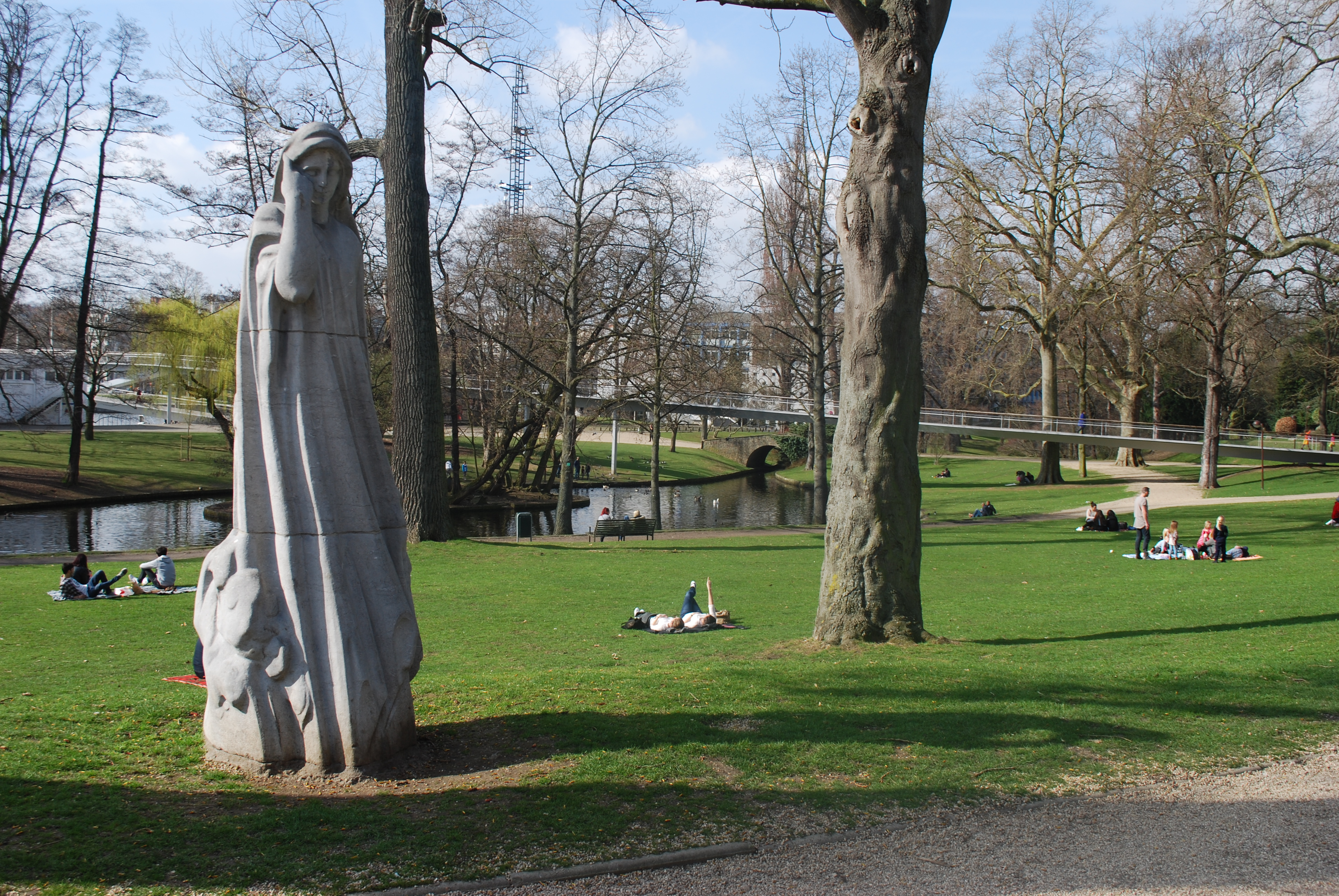 Vue des bords de la Meuse à Liège, entre le pont de chemin de fer du Val Benoît et le pont Albert Ier.